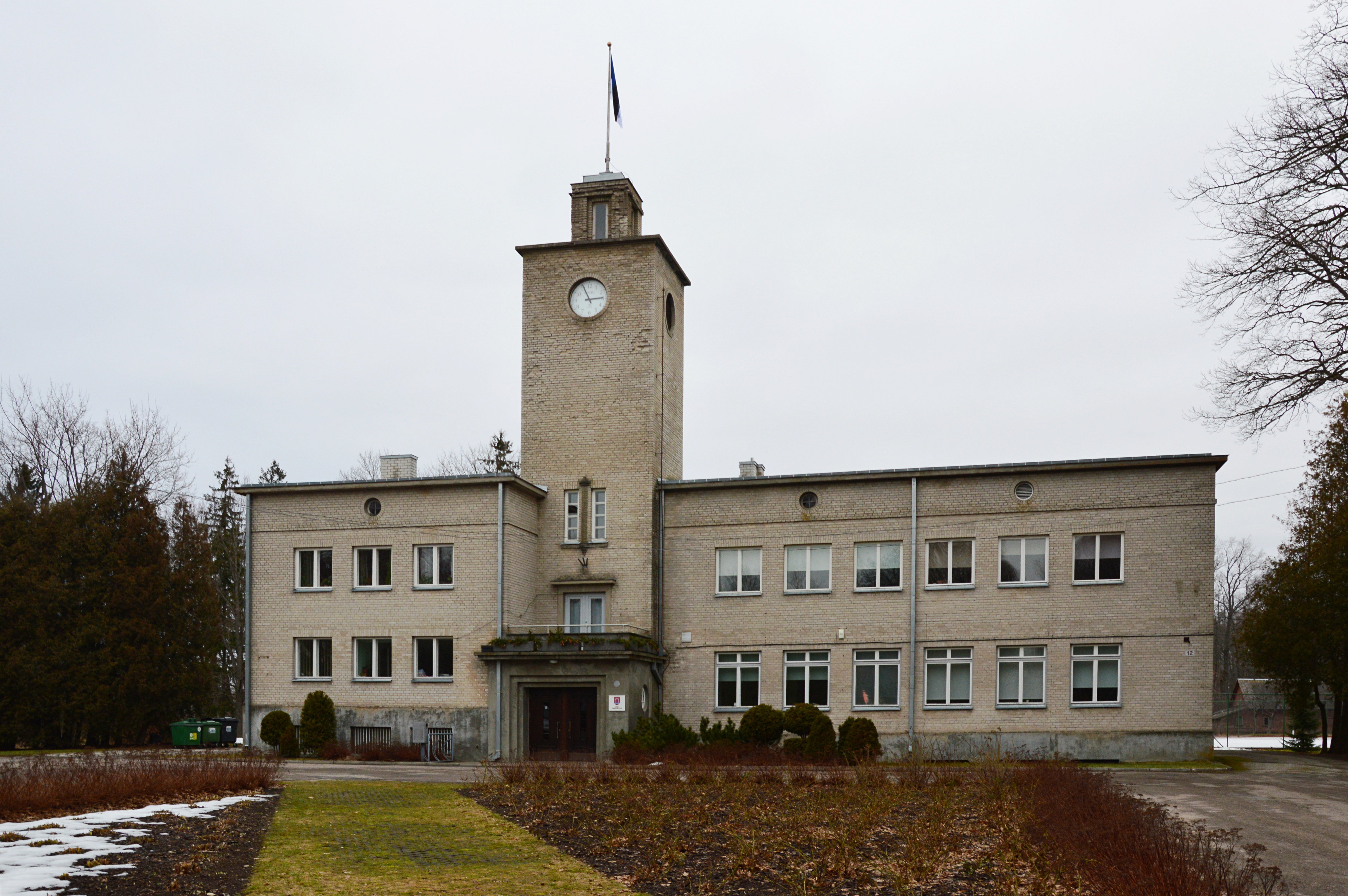 Sindi raekoda